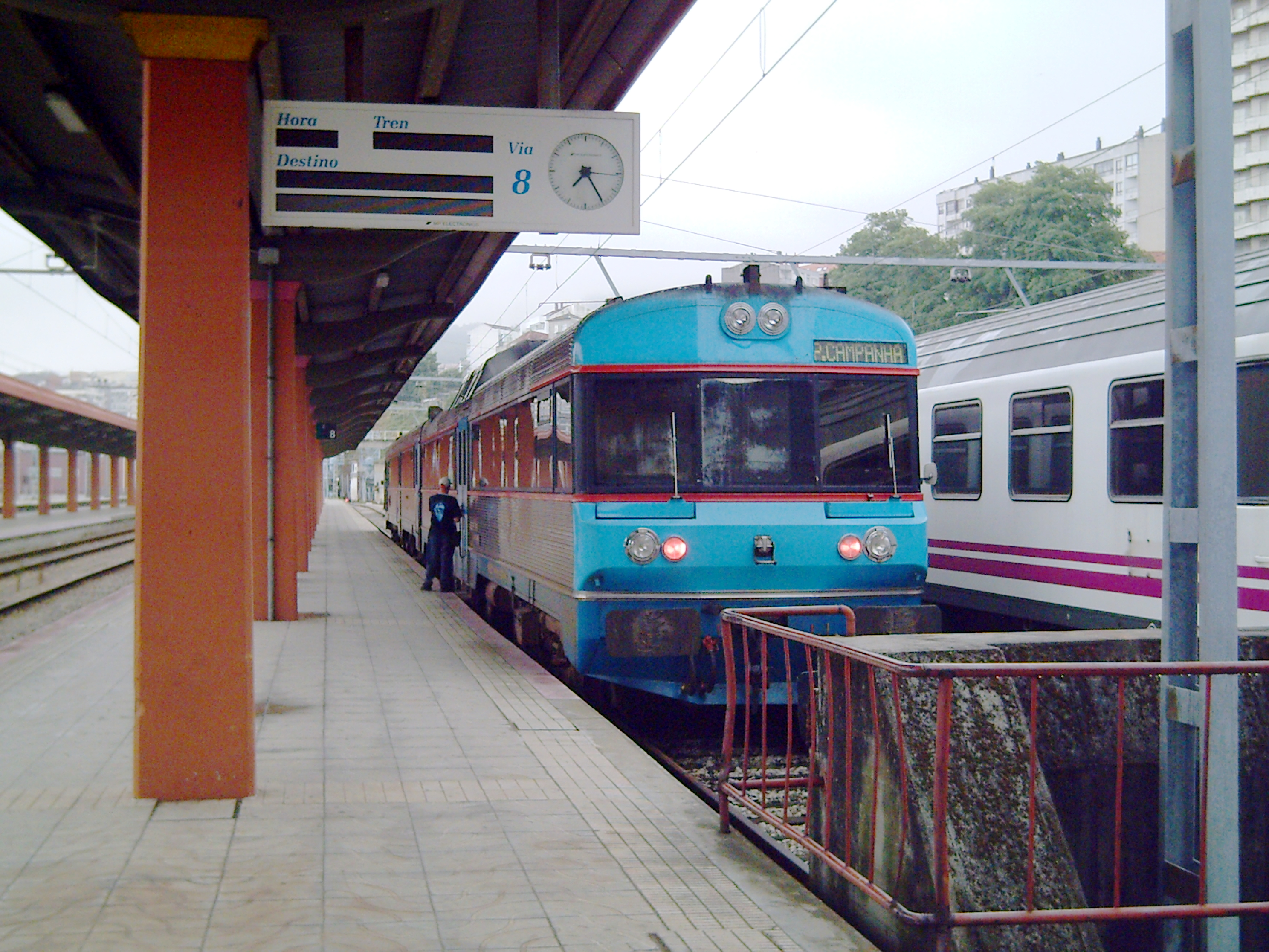 Unitat CP 450 portuguesa a l'estació de Vigo.